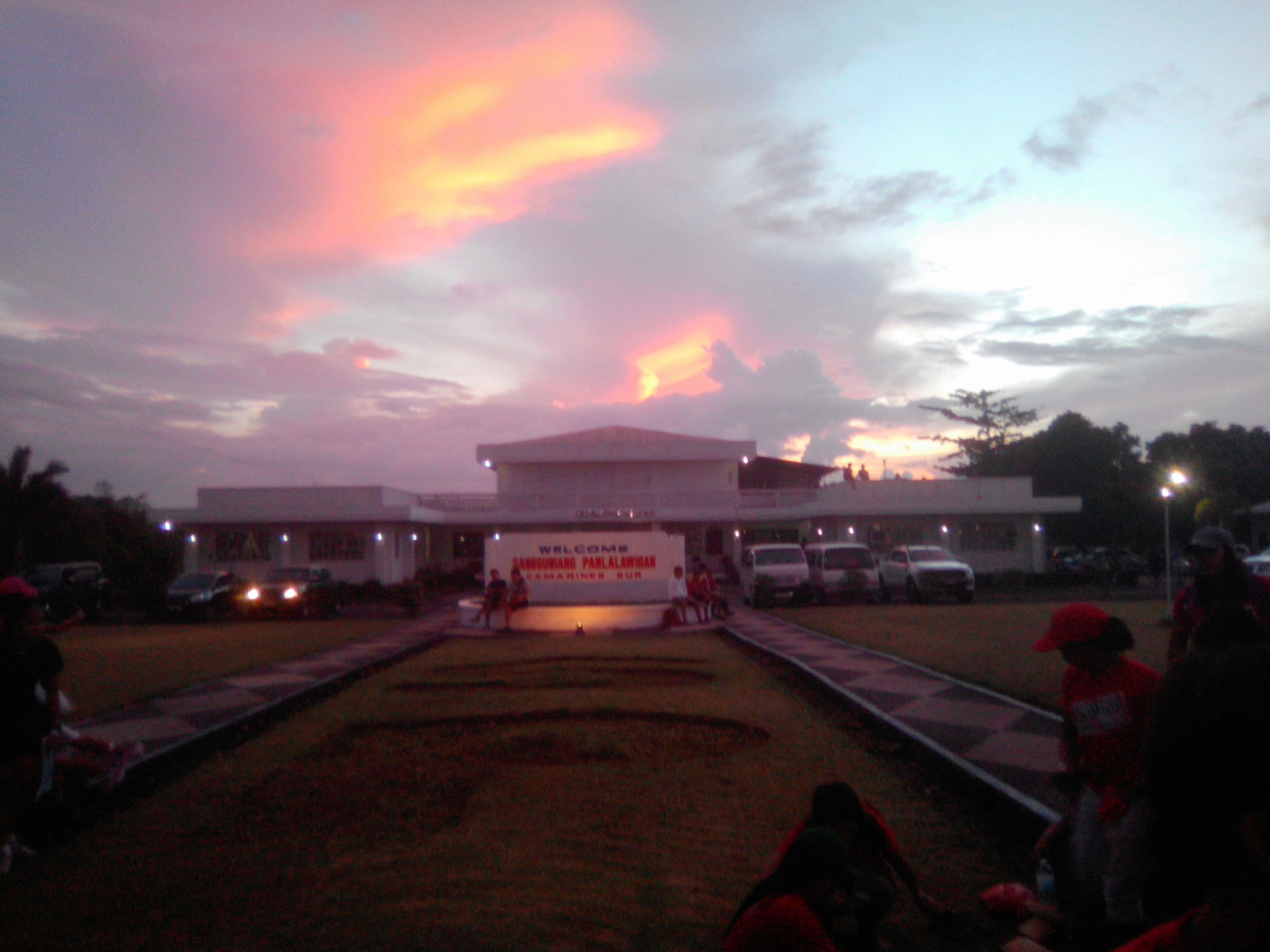 Bikol Central: An establishimento kan Sangguniang panlalawigan kan Camarines sur